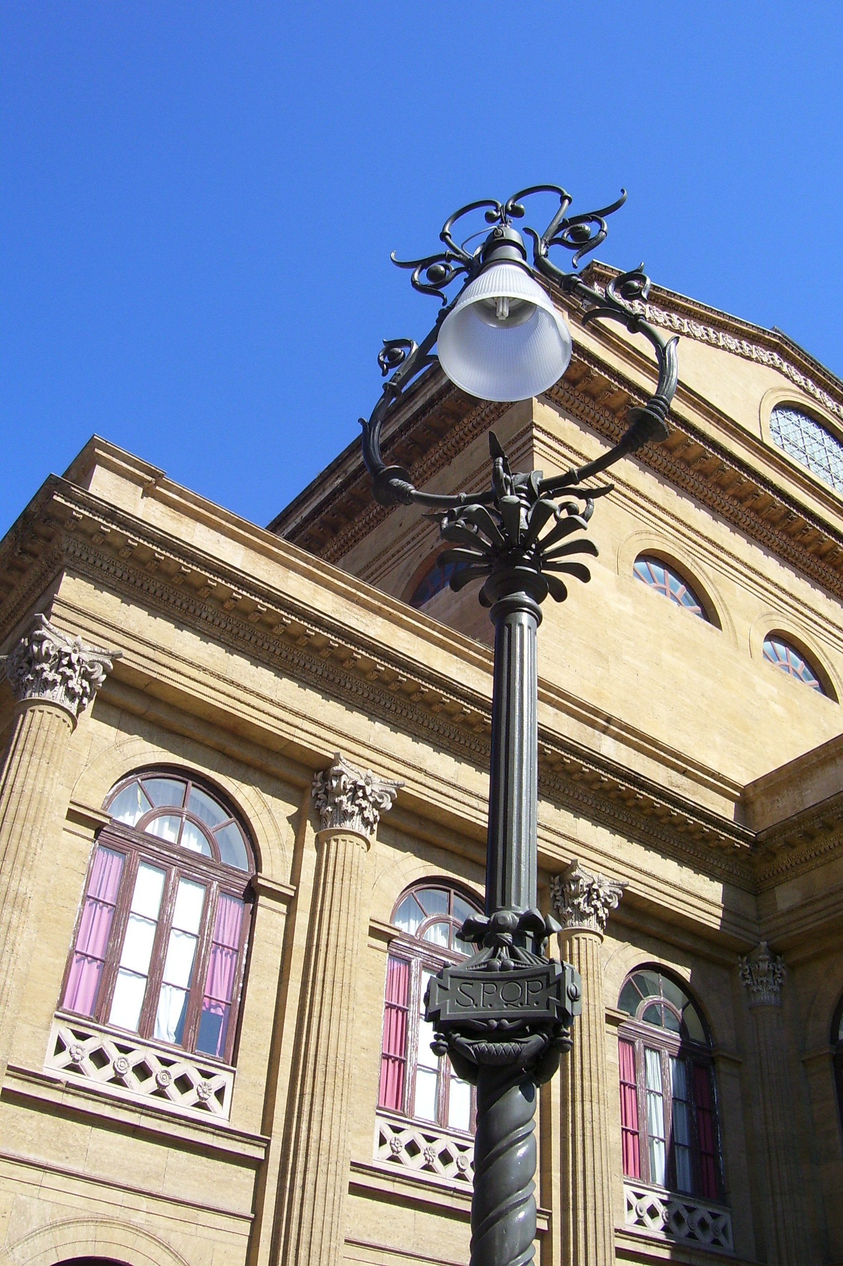 Teatro Massimo (detail), Palermo